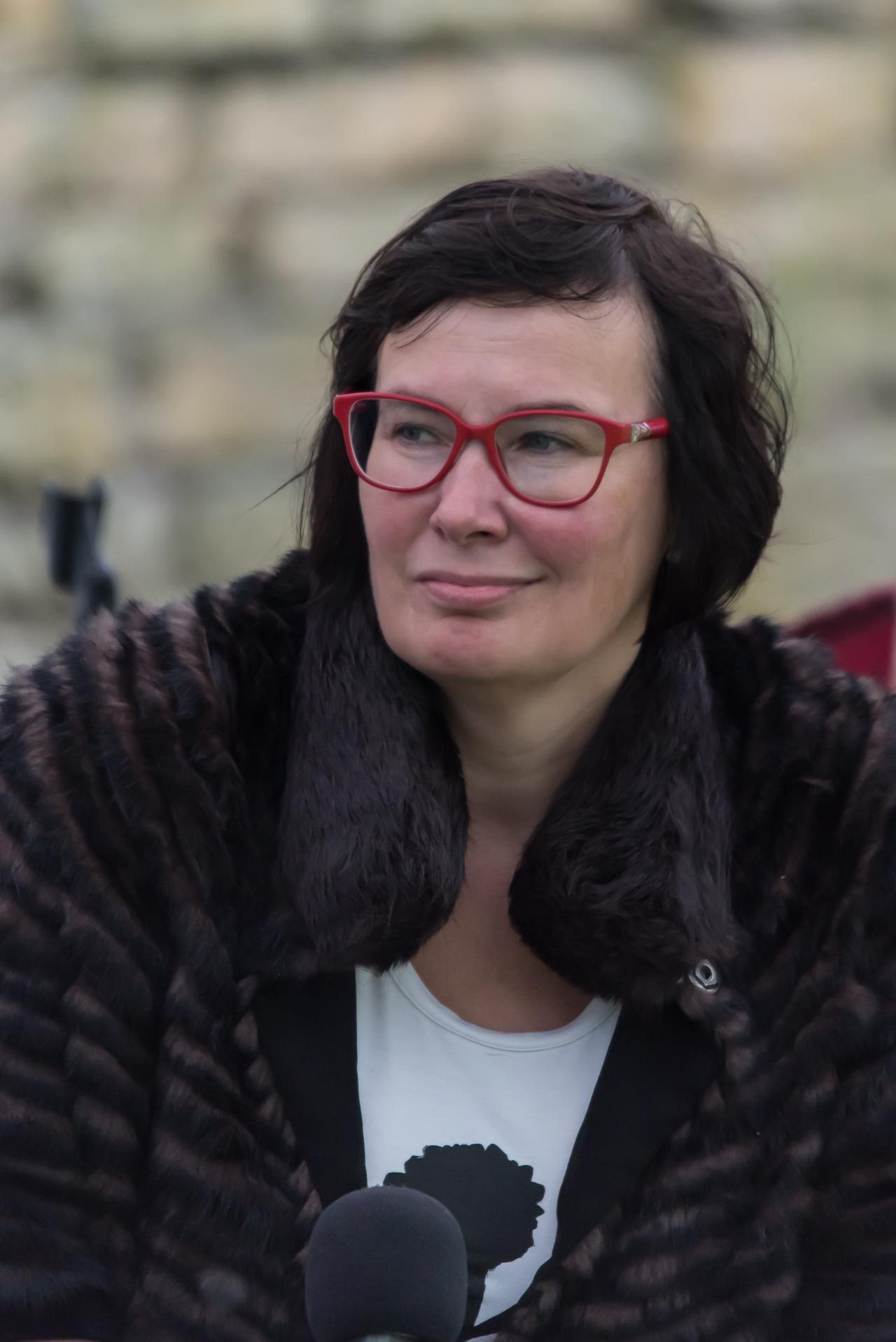 Kadri Raik teisel Arvamusfestivalil Narvas. Arutelu teemaks "Sa vaene hüljatud Ida-Virumaa".